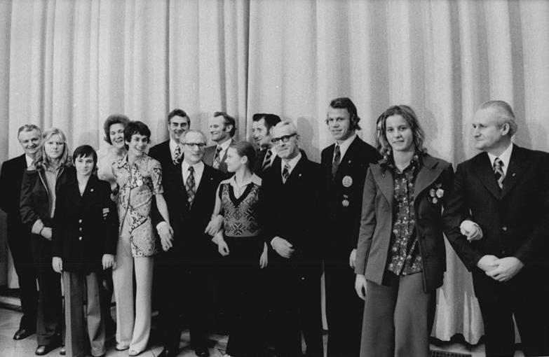 ADN-ZB-Mittelstädt-29.11.1974-Berlin: Auszeichnung verdienter Sportler. Während des festlichen Empfangs im Staatsrat stellten sich der Erste Sekretär des ZK der SED, Erich Honecker, und andere Mitglieder der Partei- und Staatsführung gemeinsam mit ausgezeichneten Sportlern, Trainern und Sportfunktionären den Fotografen. Von links: Werner Krolikowski, Anke Ohde, Annelore Zinke, Inge Lange, Gunhild Hoffmeister, Werner Lamberz, Erich Honecker, Rudolf Hellmann, Karin Janz, Manfred Ewald, Willi Stoph, Hans-Ulrich Schmied, Kornelia Ender, Günter Mittag. Protokoll, Titel und Funktionen siehe ADN-Meldung.